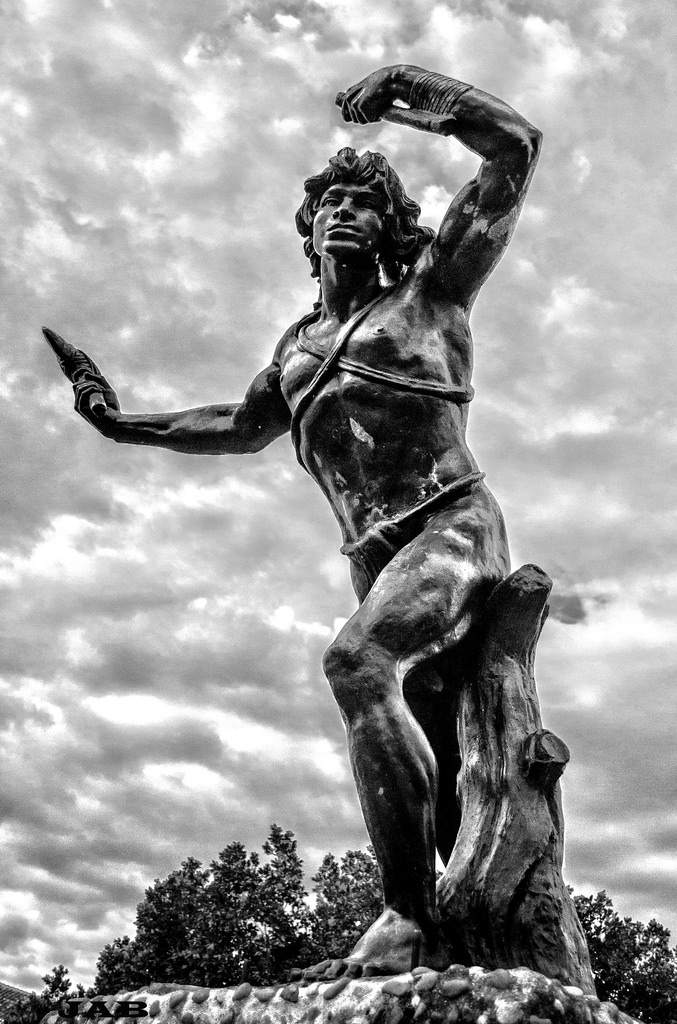 Estatua del Indio Urracá, situada en la Escuela Normal Juan Demóstenes Arosemena